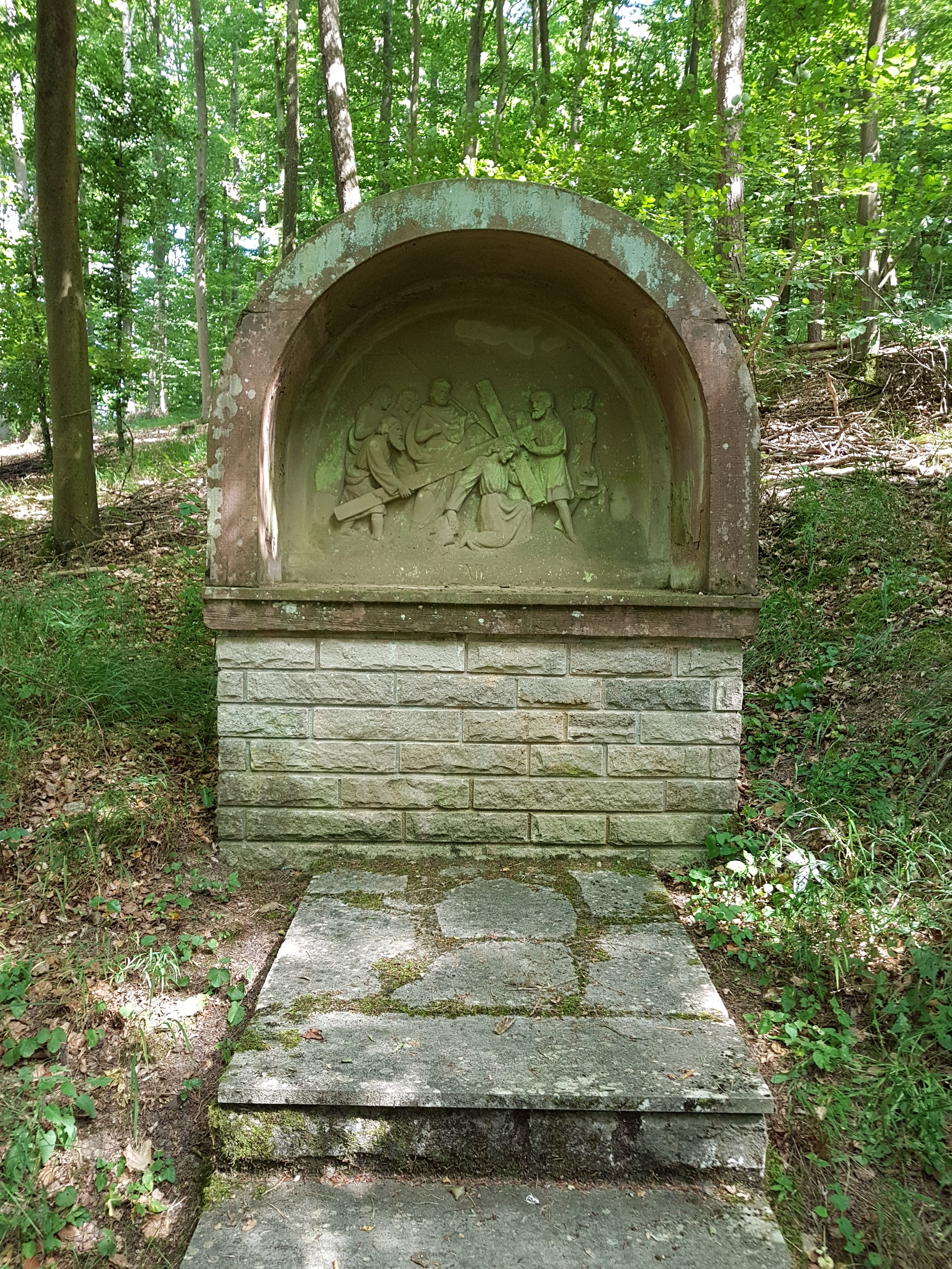 Kreuzweg zur Dittwarer Kreuzkapelle am Kreuzhölzle Bilder hochkant